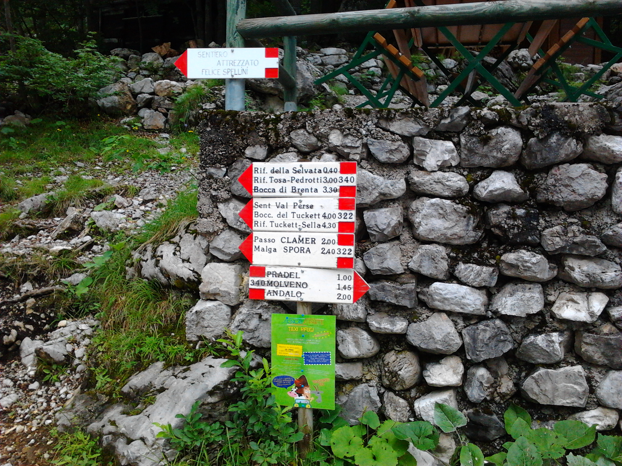 Indicazioni per i rifigi delle dolomiti del Brenta, presso il rifugio Croz dell'Altissimo